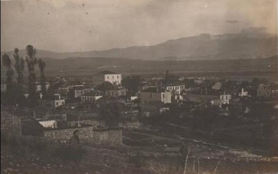 Екши Су през Първата световна война.